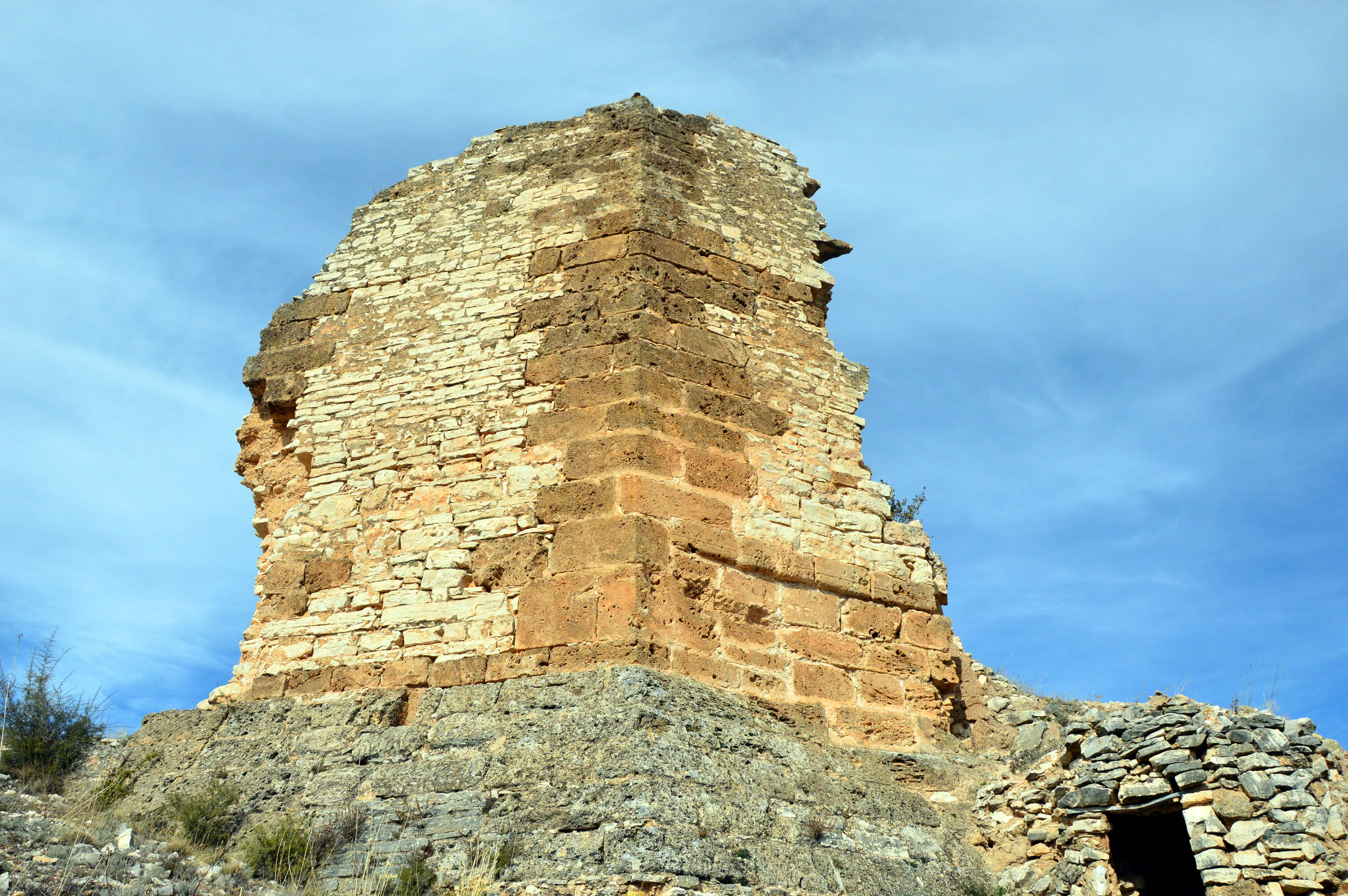 Vista meridional del torreón de La Torreta en Castielfabib (Valencia), perteneciente al recinto amurallado de la villa por occidente, con detalle del muro en talud de la base (2019).